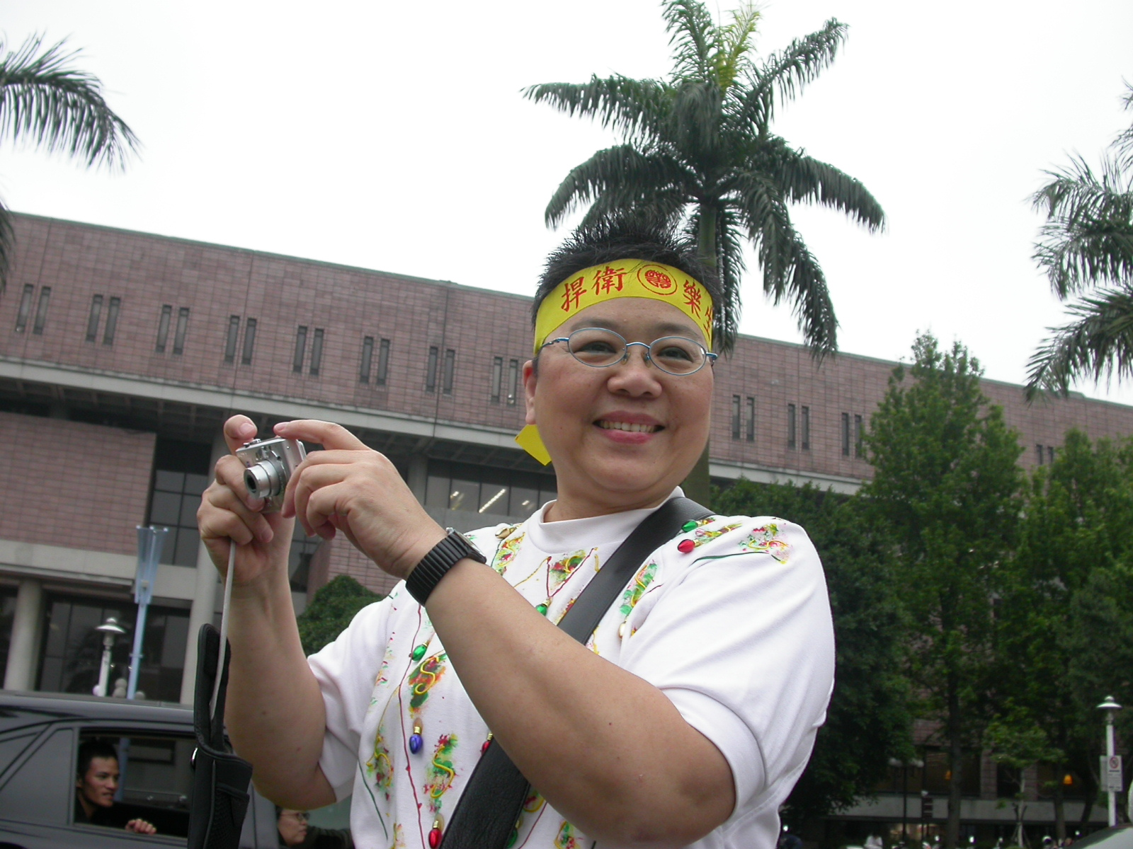 國立中央大學性／別研究室召集人何春蕤。